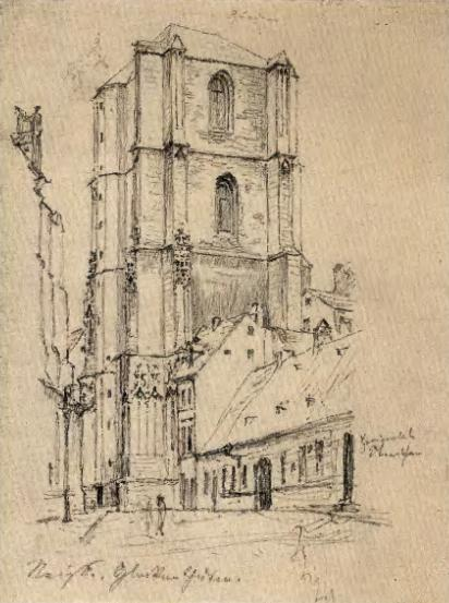 Dzwonnica katedry w Nysie